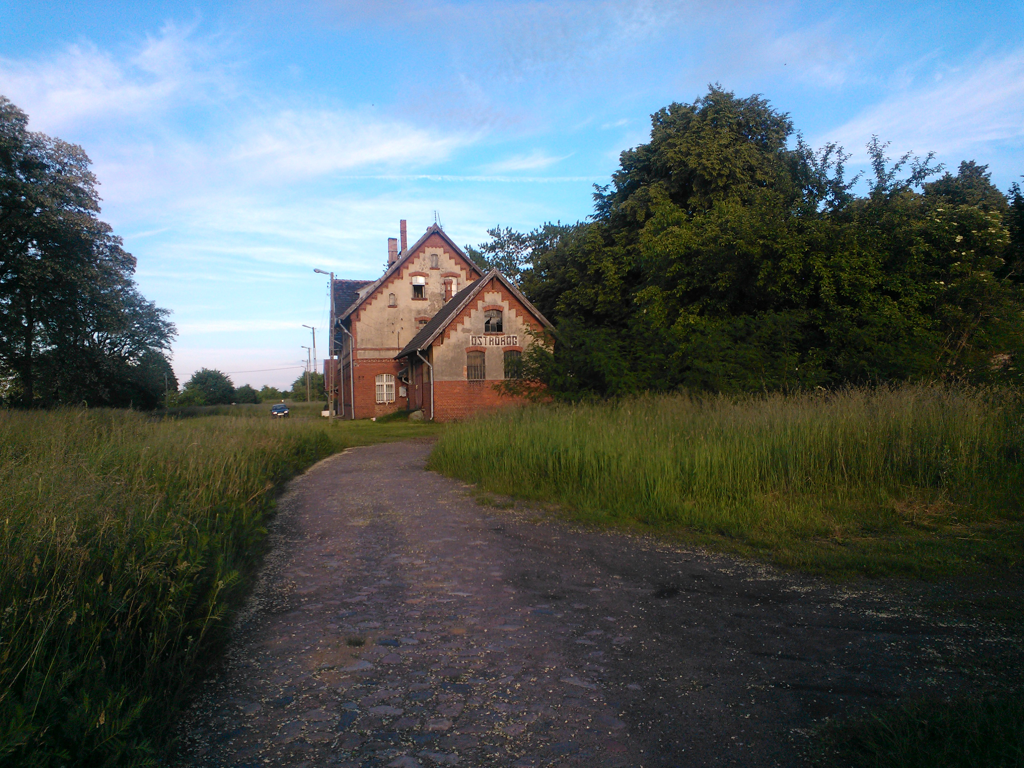 Ostroróg - dawny dworzec kolejowy na nieczynnej linii kolejowej z Szamotuł do Międzychodu